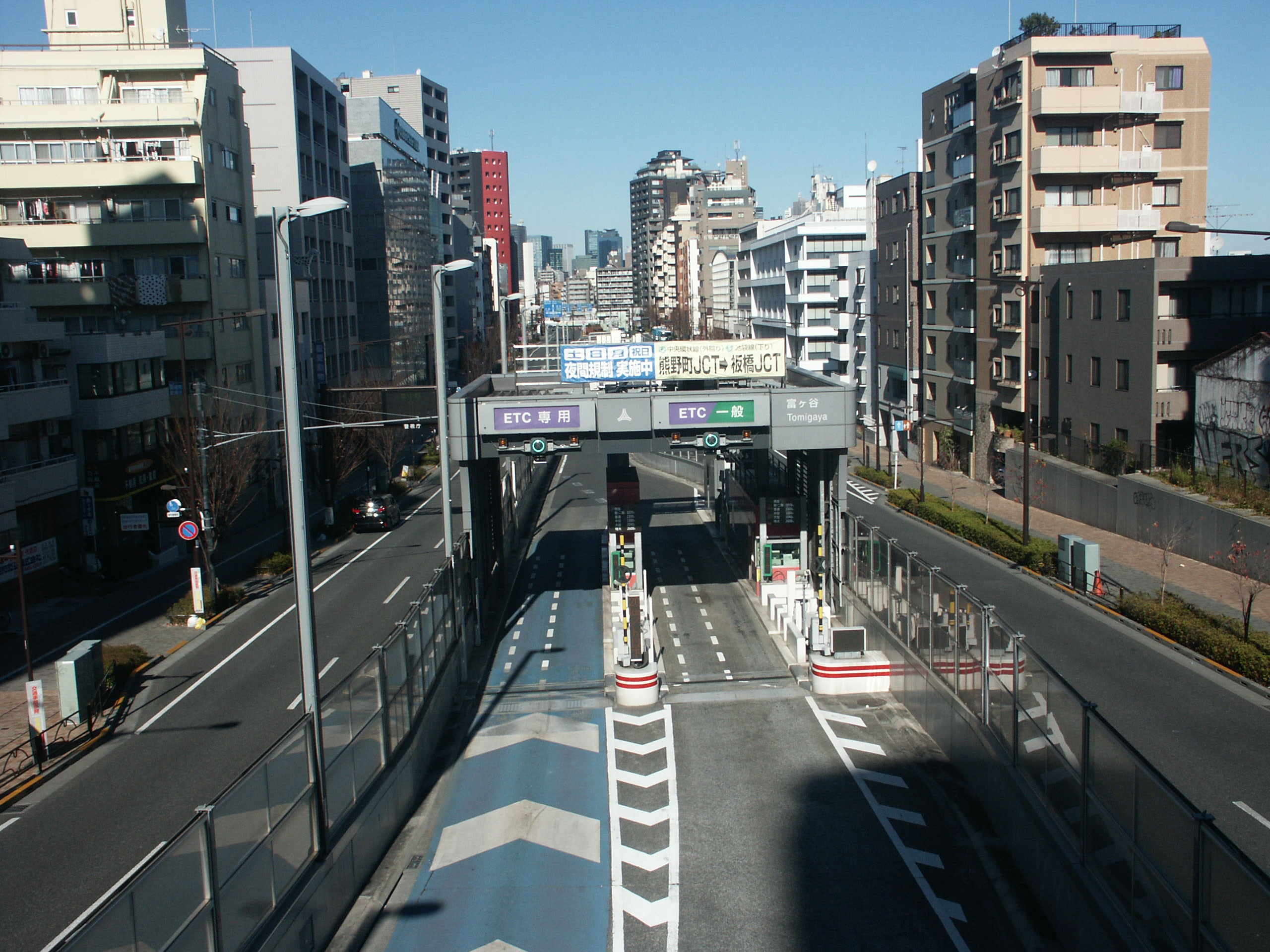 首都高速道路中央環状線富ヶ谷入口料金所付近